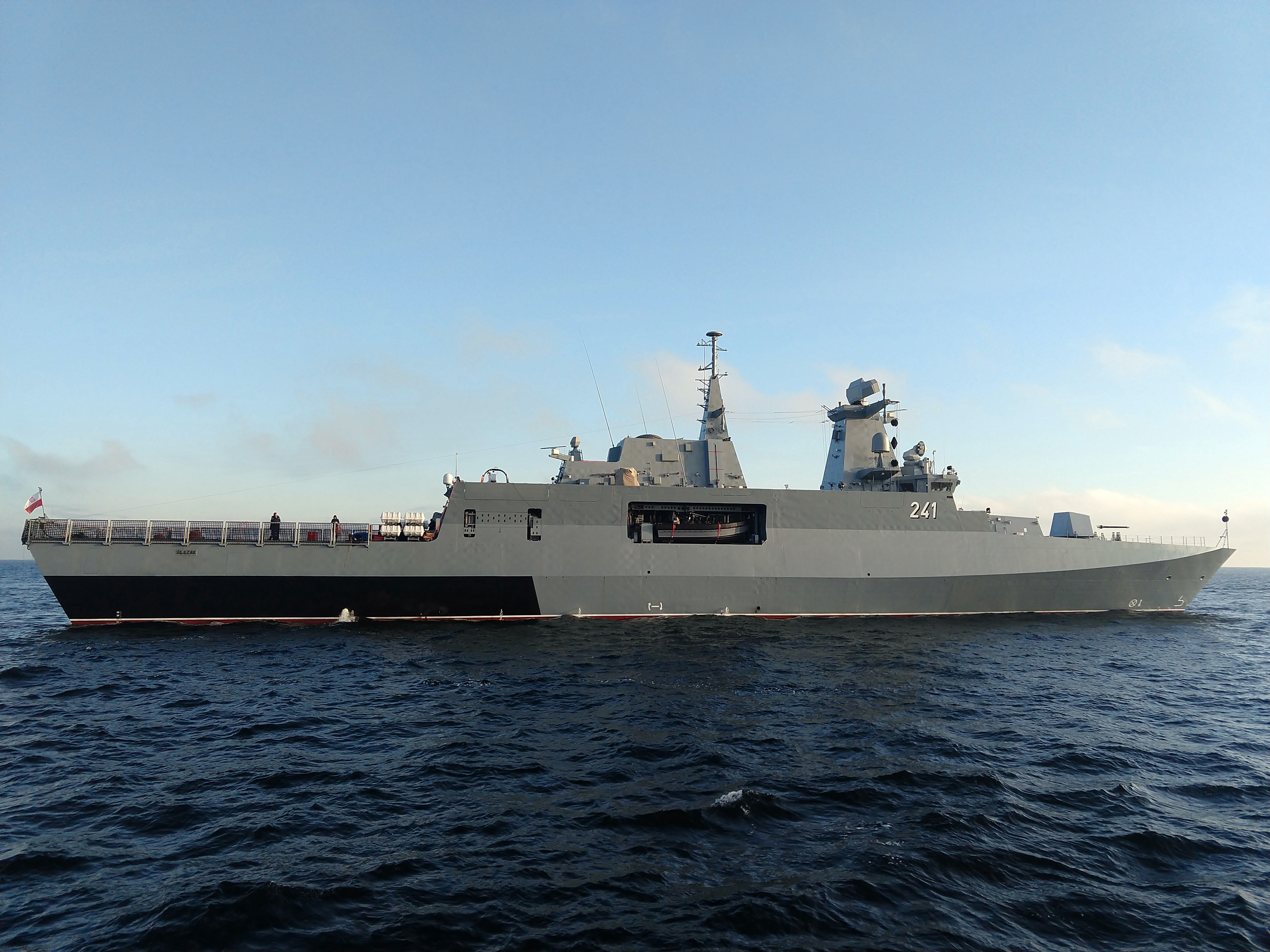 ORP „Ślązak” podczas prób stoczniowych na Zatoce Gdańskiej.